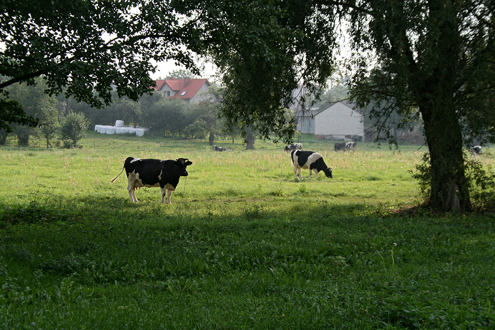 Na pastwisku pasą się krowy w okolicy Zabłocia